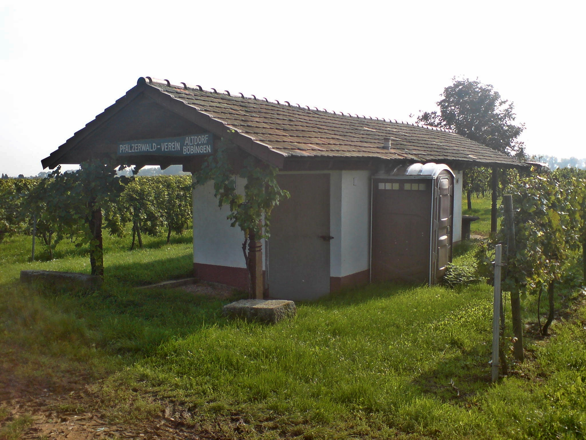 Die Vereinshütte "Schmied Kurt’s Haisel" des PWV Altdorf-Böbingen.